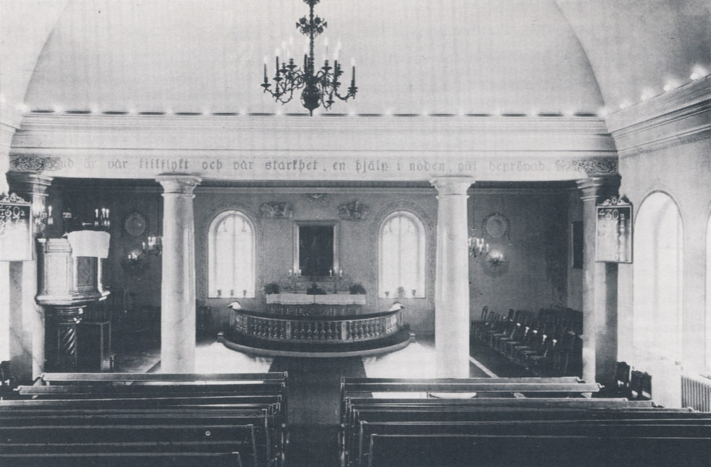 Kyrksalen i Centralfängelset, Långholmen